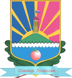 Герб смт. Станиця Луганська